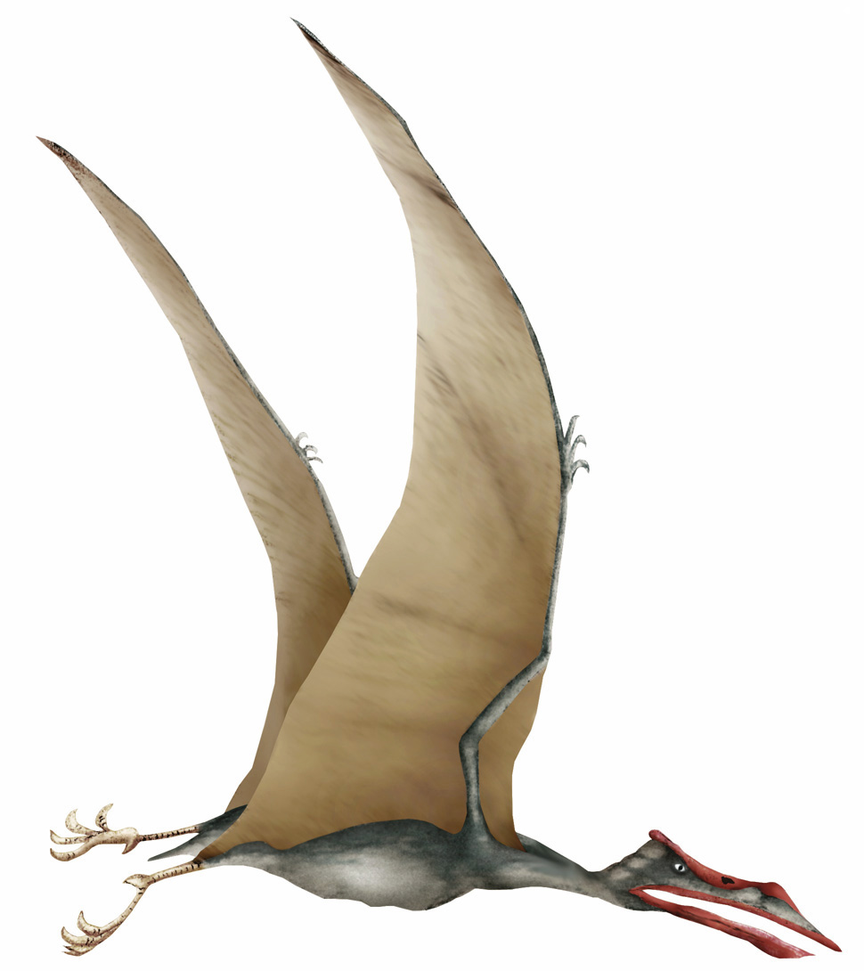 Representación gráfica de un Quetzalcoatlus. Ilustración realizada por usuario LeCire para su uso en Wikipedia, técnica a lapiz de color con edición de retoque digital. Graphical depiction of a Quetzalcoatlus. Illustration made by user LeCire for its use on Wikipedia, color pencil technique with edition of digital enhancement.